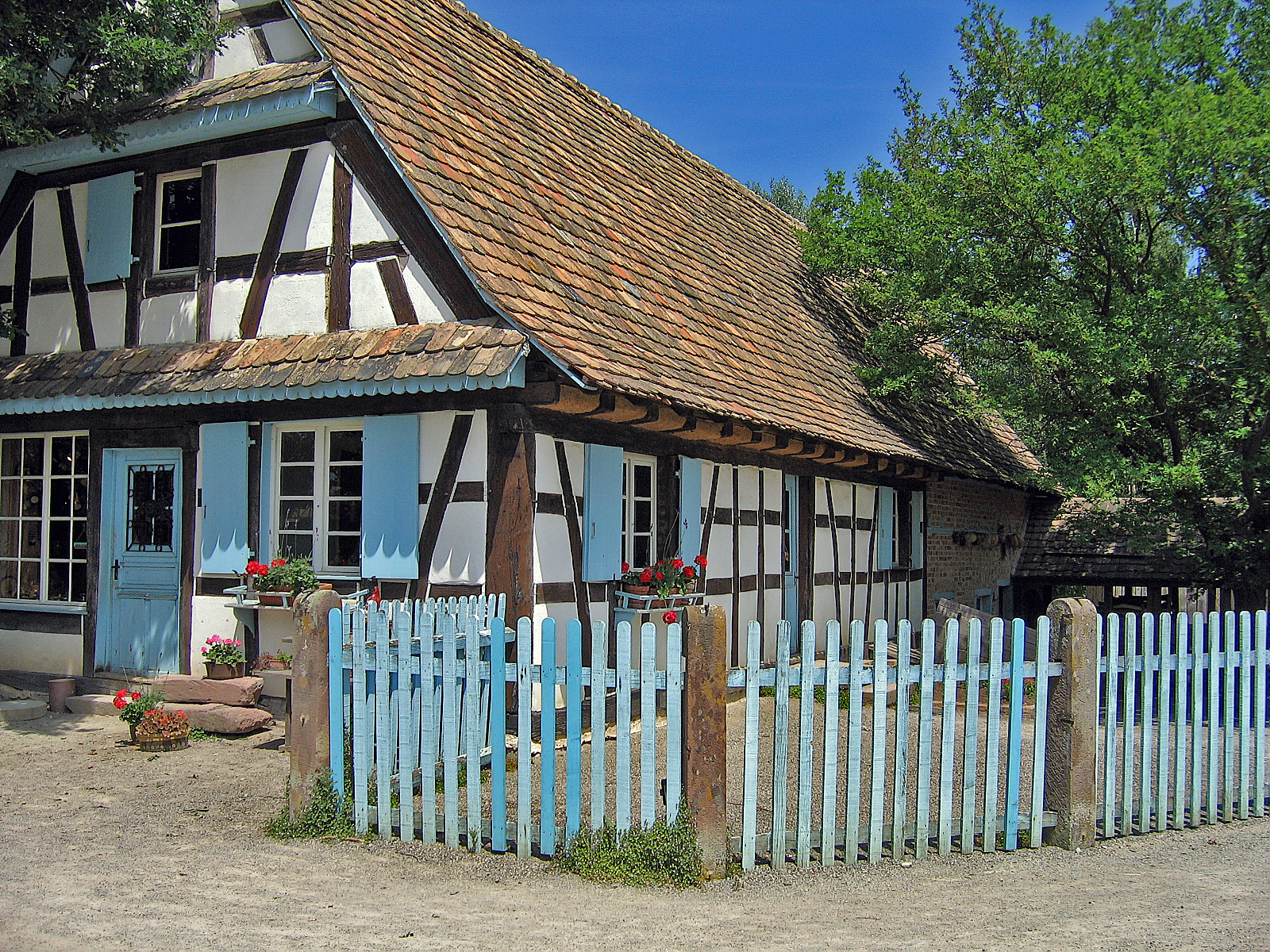 Jean-Pierre Daniel - Maison alsacienne 2 - Écomusée d'Alsace